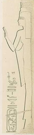 Isis-ta-hemdjert from Karnak